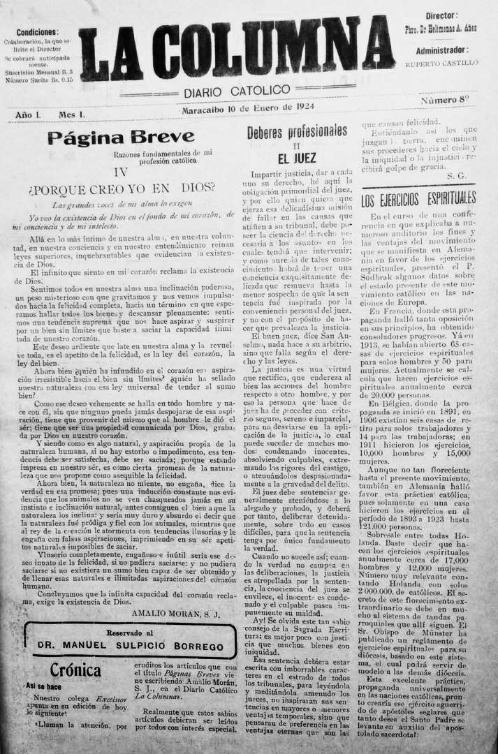 Primera página del ejemplar número 8 del diario "La Columna" de Maracaibo, fundado por la periodista Teresa López Bustamante, el 2 de enero de 1924.